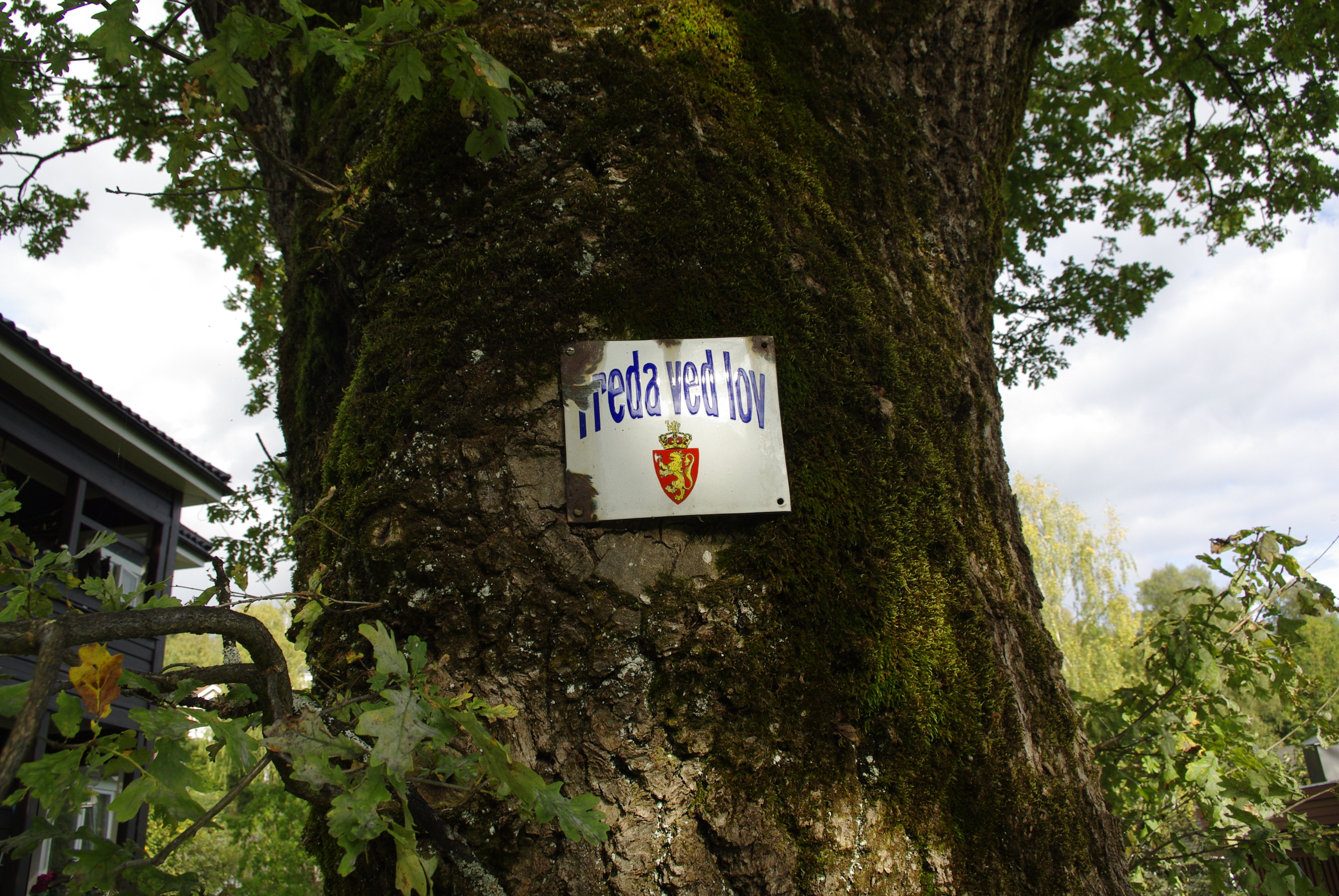 Nærbilde av skiltet på den fredede eika